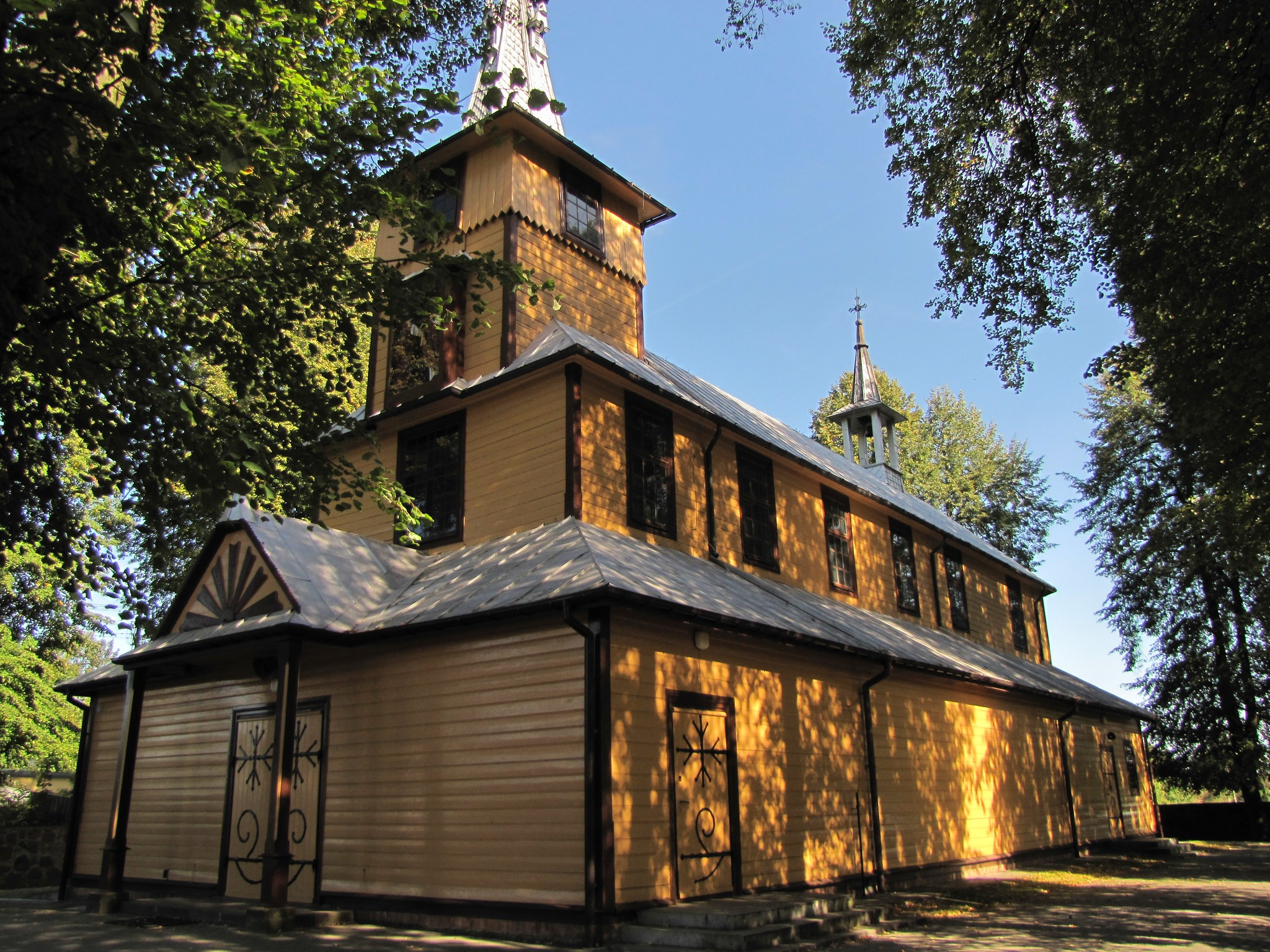 Swory Kościół